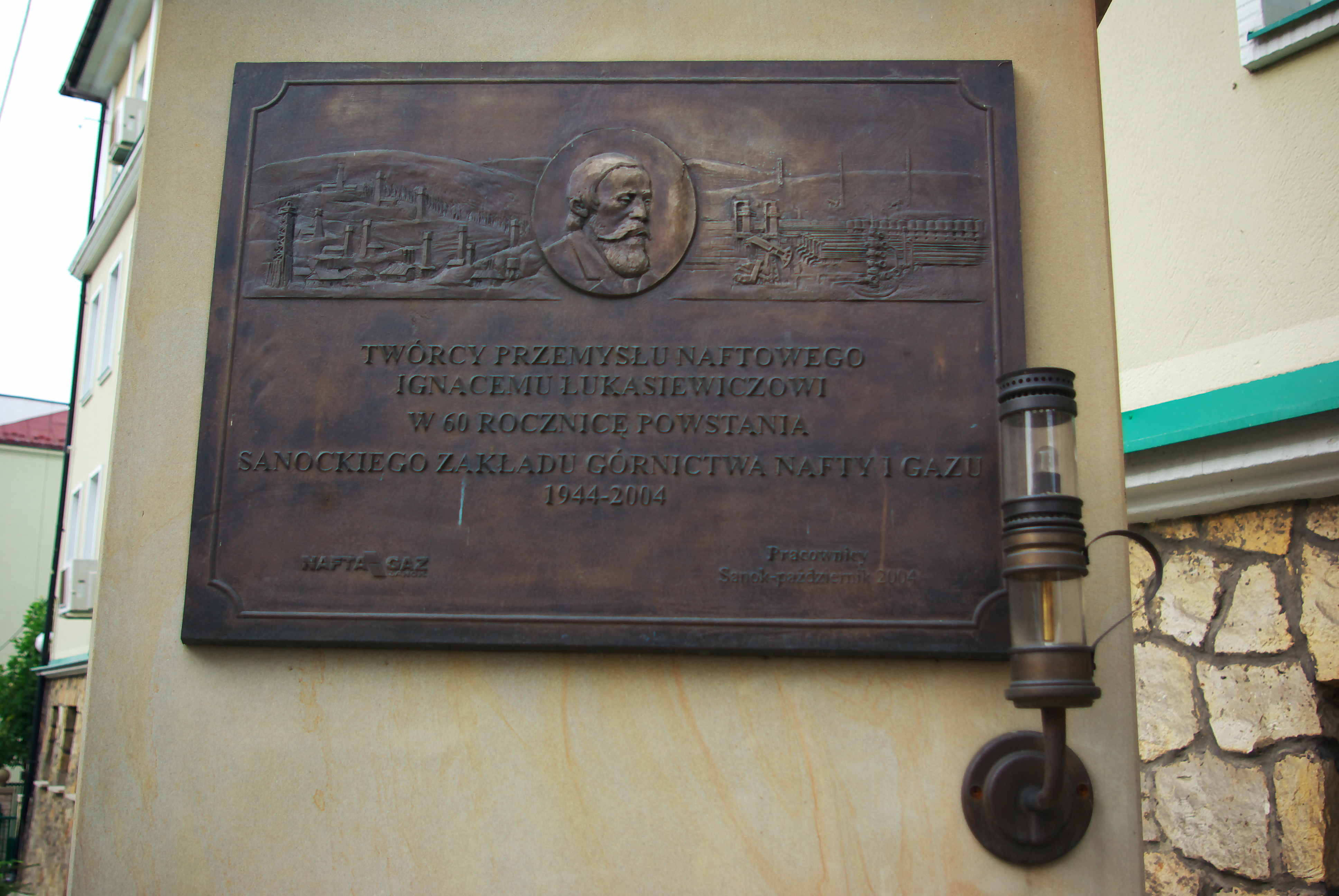 Tablica poświęcona Ignacemu Łukasiewiczowi obok budynku PGNiG przy ulicy Sienkiewicza 12 w Sanoku